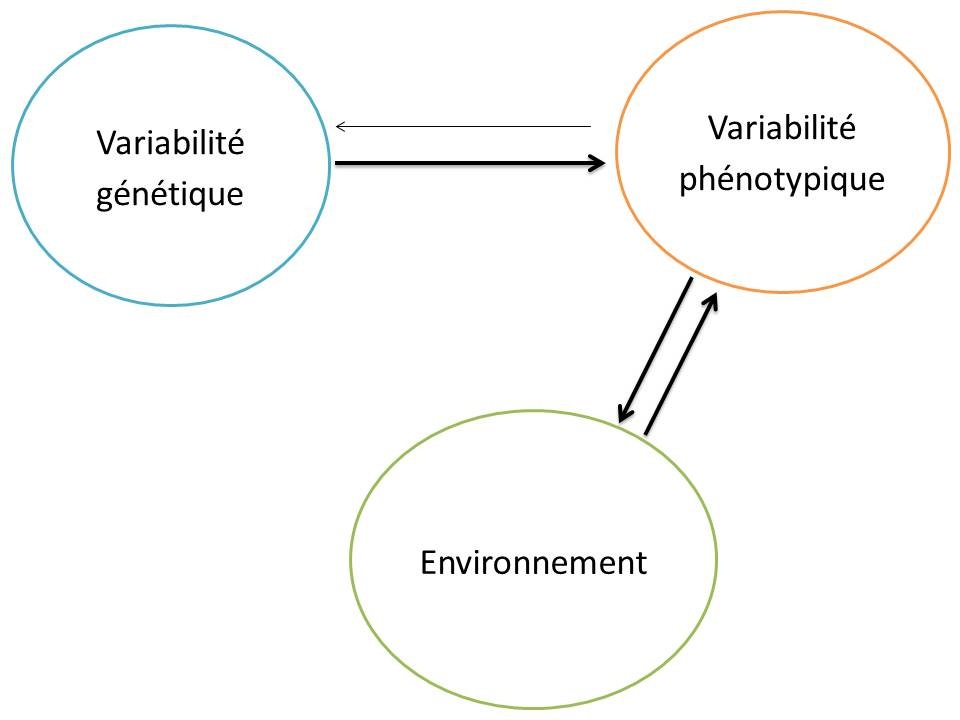 On a une boucle de rétroaction entre l'environnement et la variabilité phénotypique. On a une variabilité génétique qui donne naissance à une certaine variabilité phénotypique. L'environnement influence la variabilité phénotypique et la variabilité phénotypique influence aussi l'environnement.